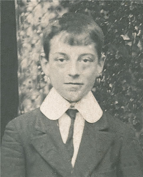 Imagen de niño del poeta Rafael Alberti